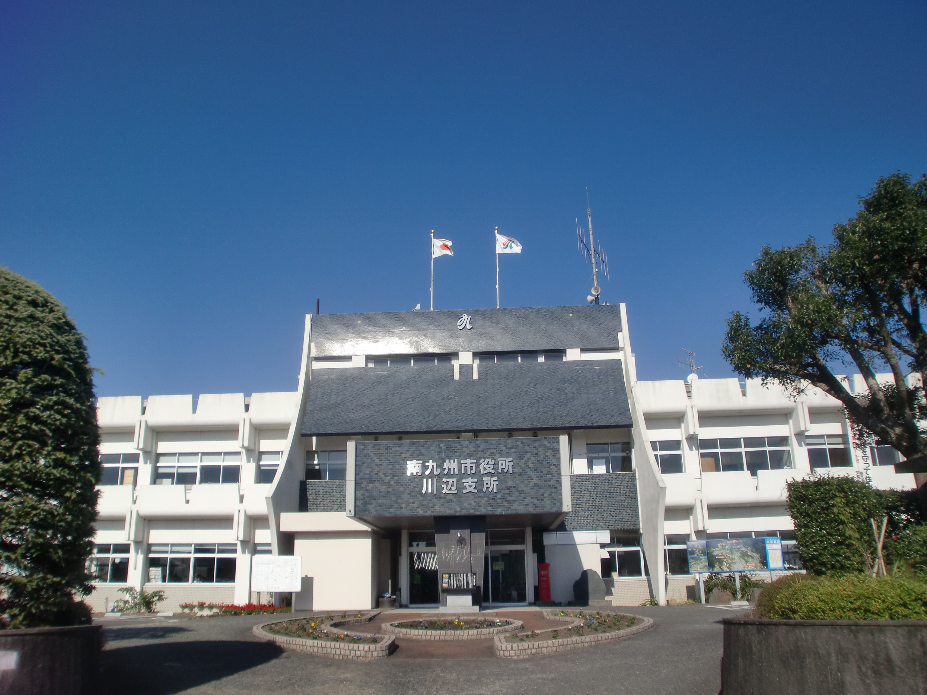 南九州市役所川辺支所（旧川辺町役場）の外観。